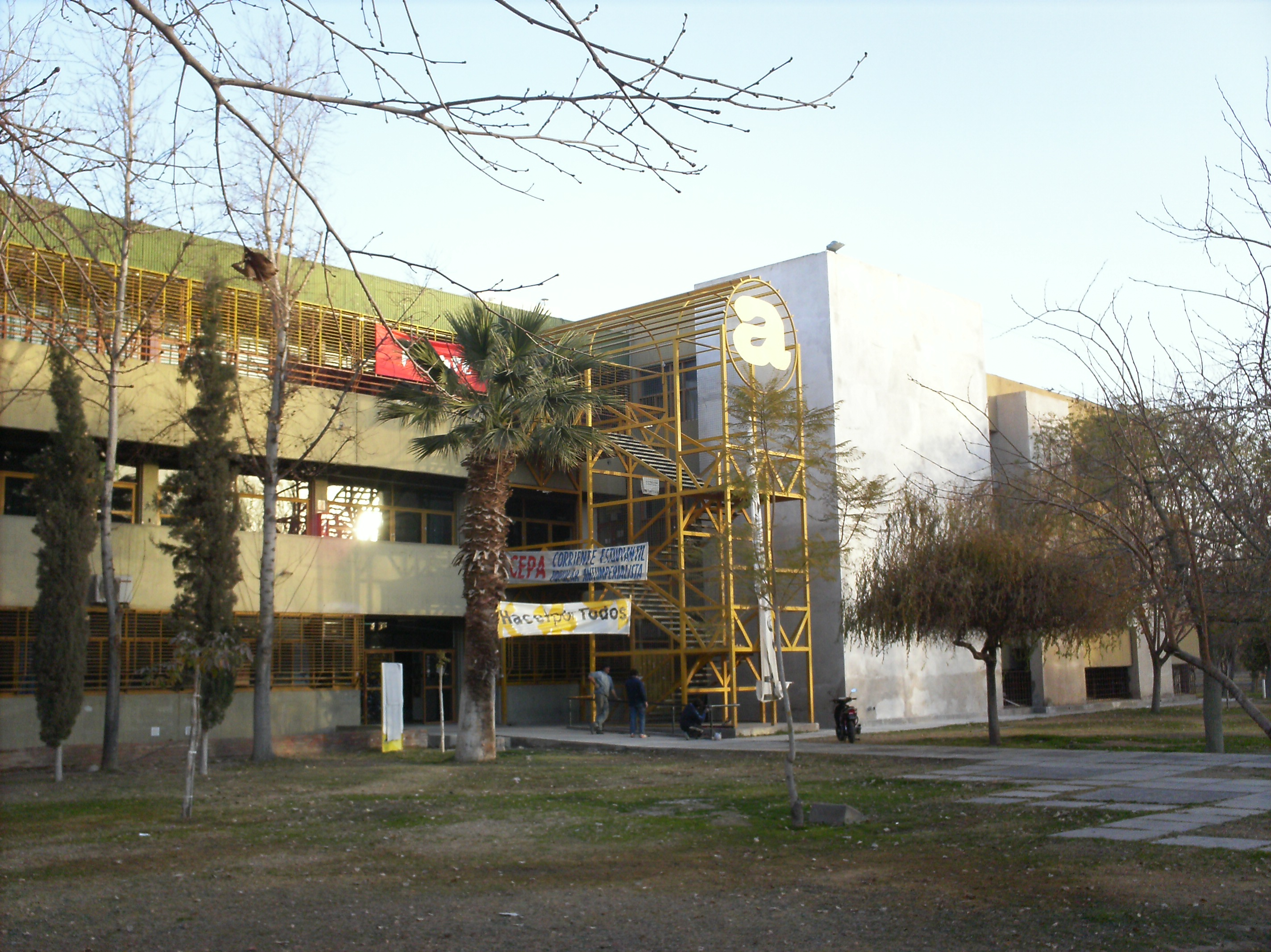 la facultad de arquitectura emplazada en una zona parquizada